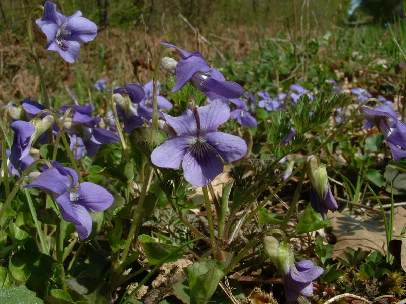 Violette, photo J.F. Gaffard, Bucey-lès-Gy, mai 2004